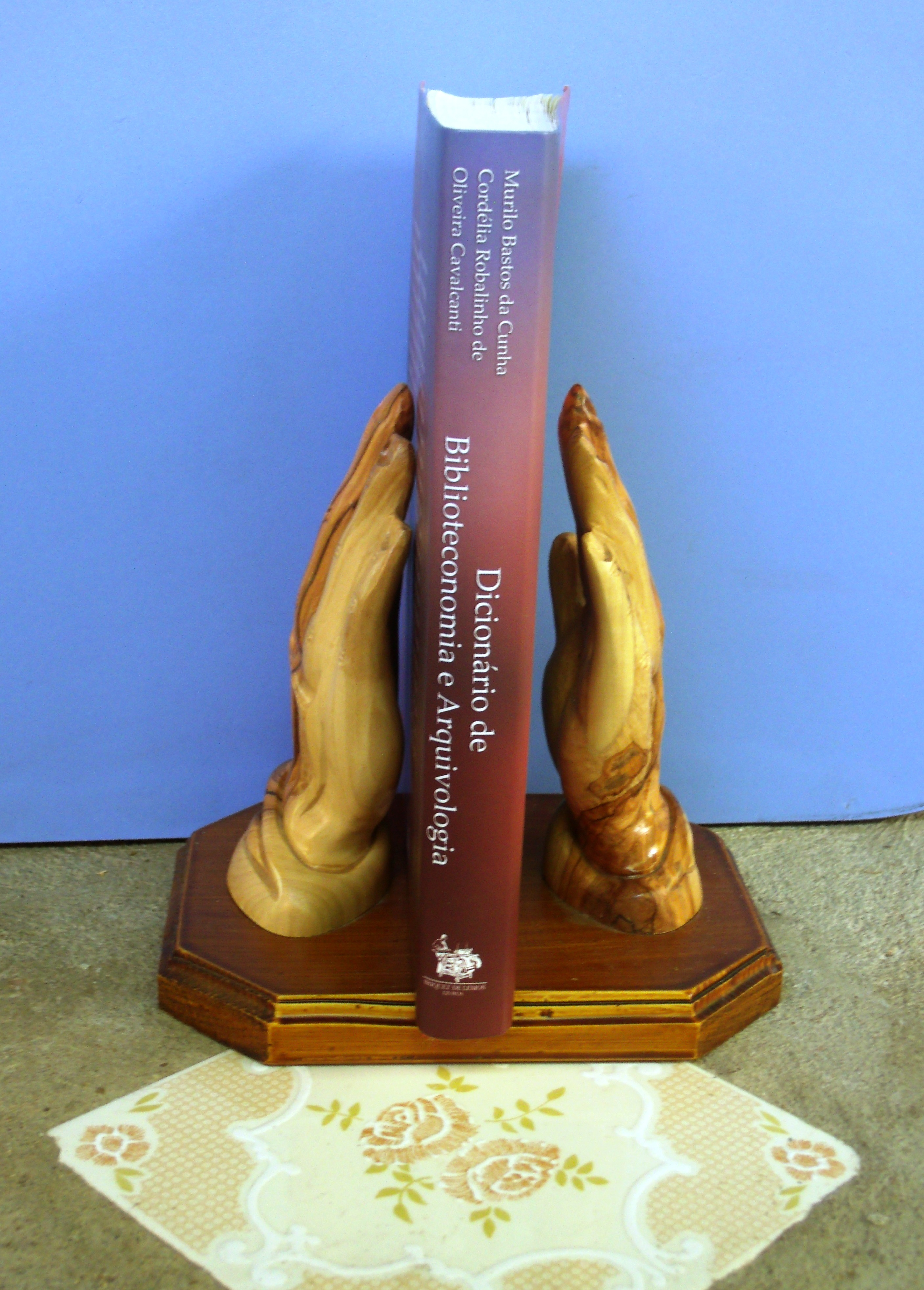 Imagem de um Dicionário de Biblioteconomia e Arquivologia, editado no Brasil em 2008.